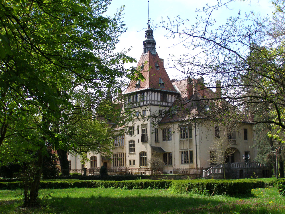 Castle in Donji Miholjac